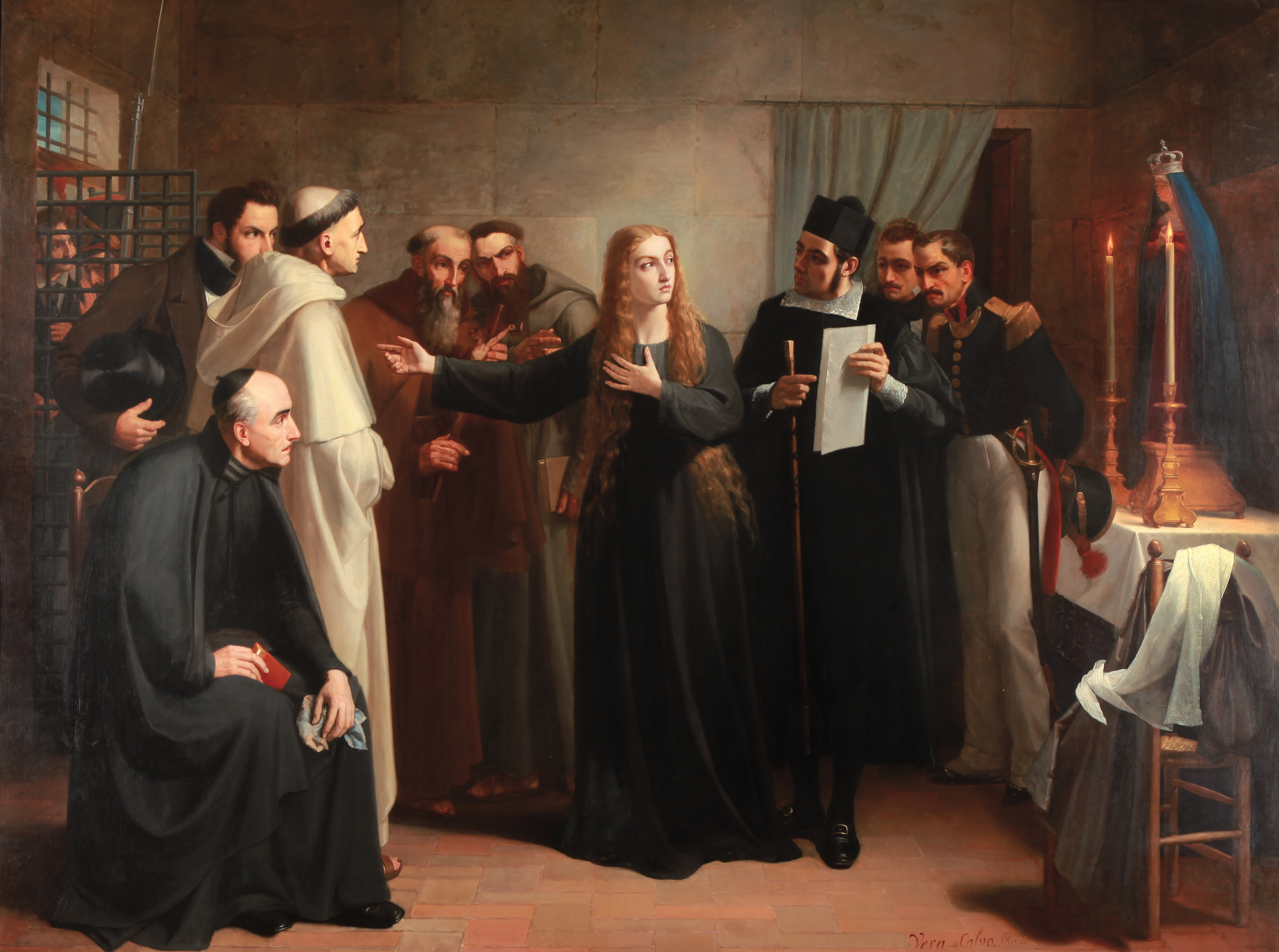 El lienzo representa a Mariana Pineda (1804-1831), en capilla en vísperas de su ejecución y en el momento en el que se dirigía al patíbulo. Fue condenada a muerte en 1831, durante el reinado de Fernando VII de España, por sus ideas liberales, y fue ajusticiada en el garrote vil a los veintiséis años, el día 26 de mayo de 1831. Sus restos reposan en la actualidad en la cripta de la catedral de Granada.